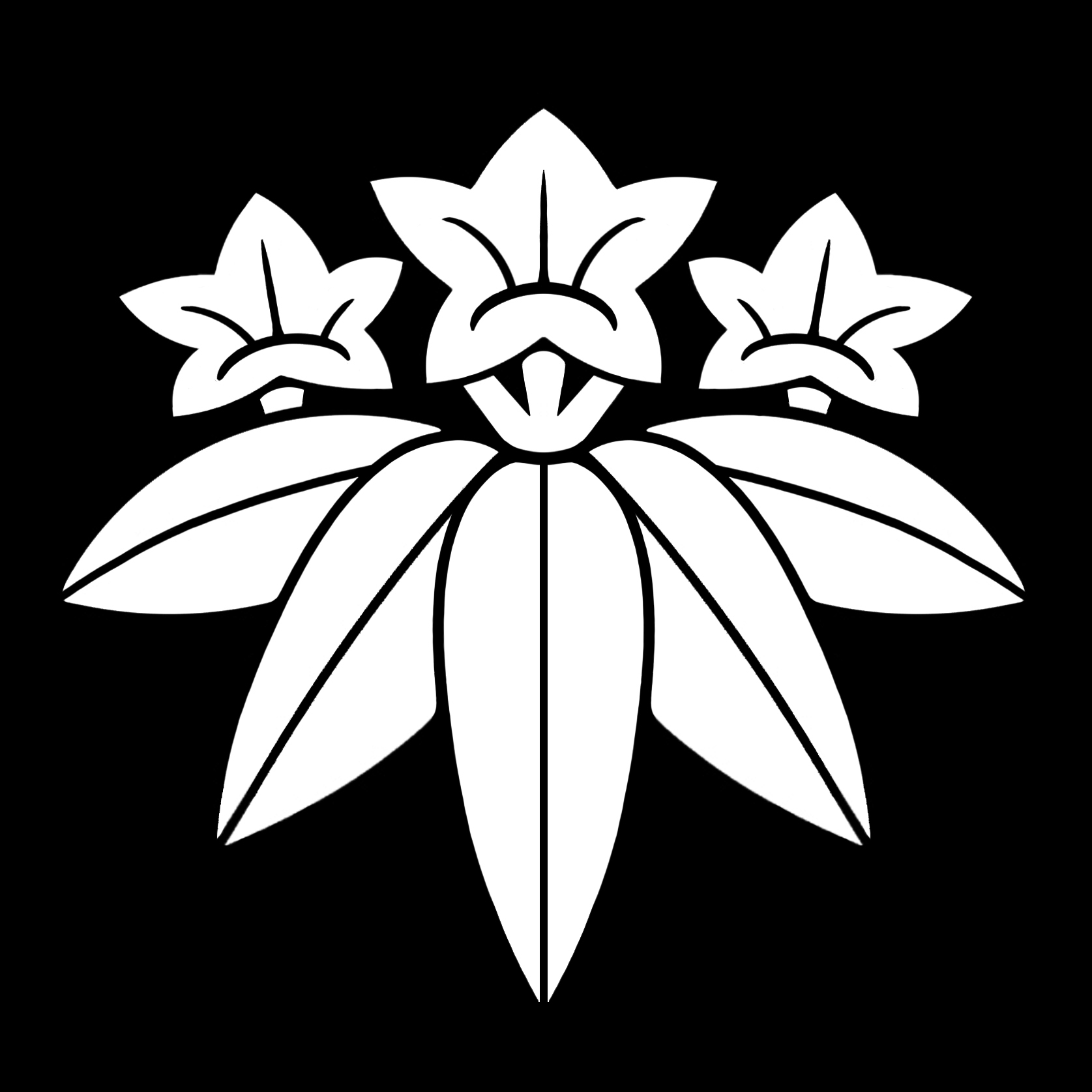 「笹竜胆」紋（染抜）